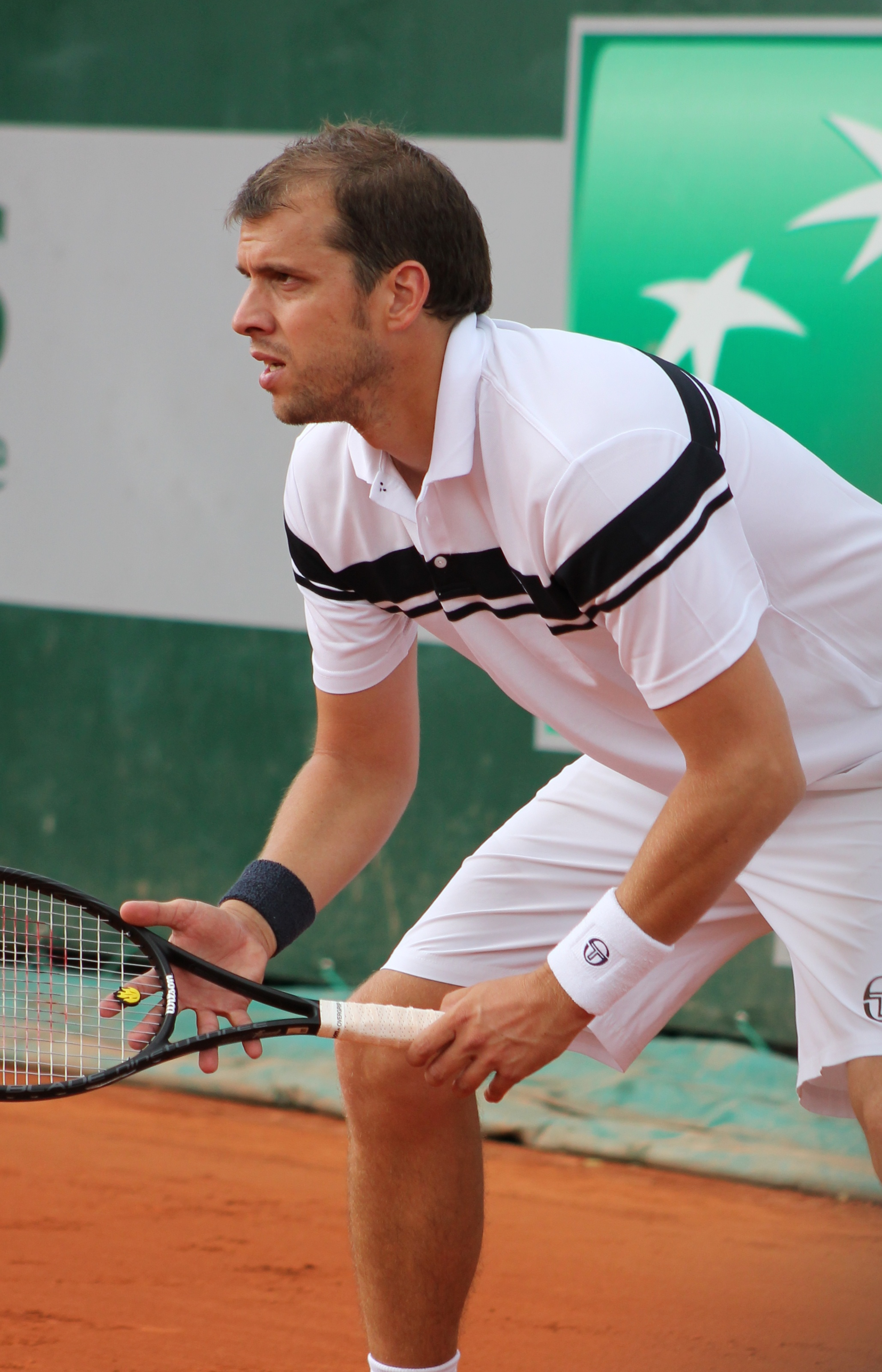 Muller RG13 (2)